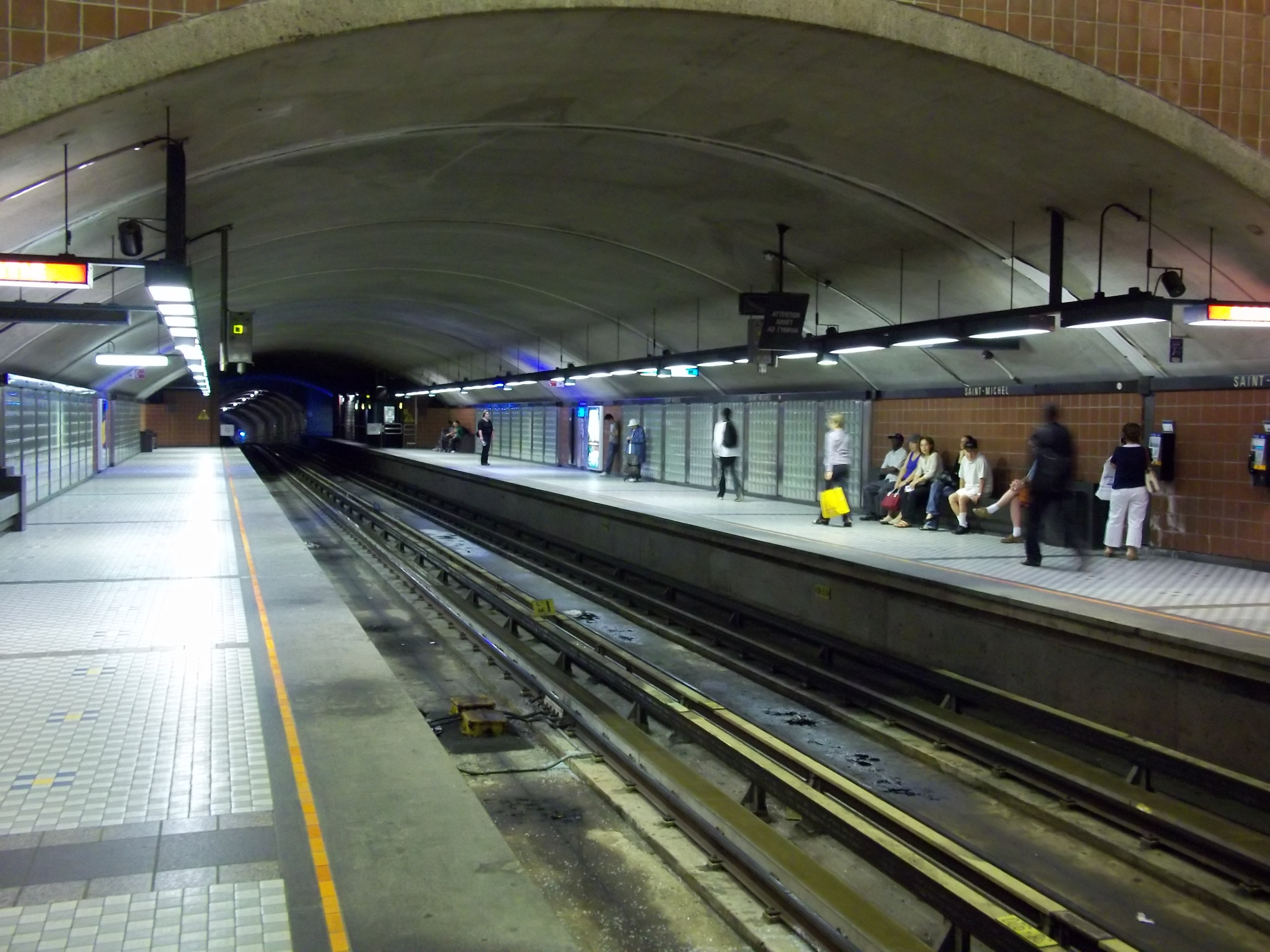 Quai de la station de métro Saint-Michel, Montréal